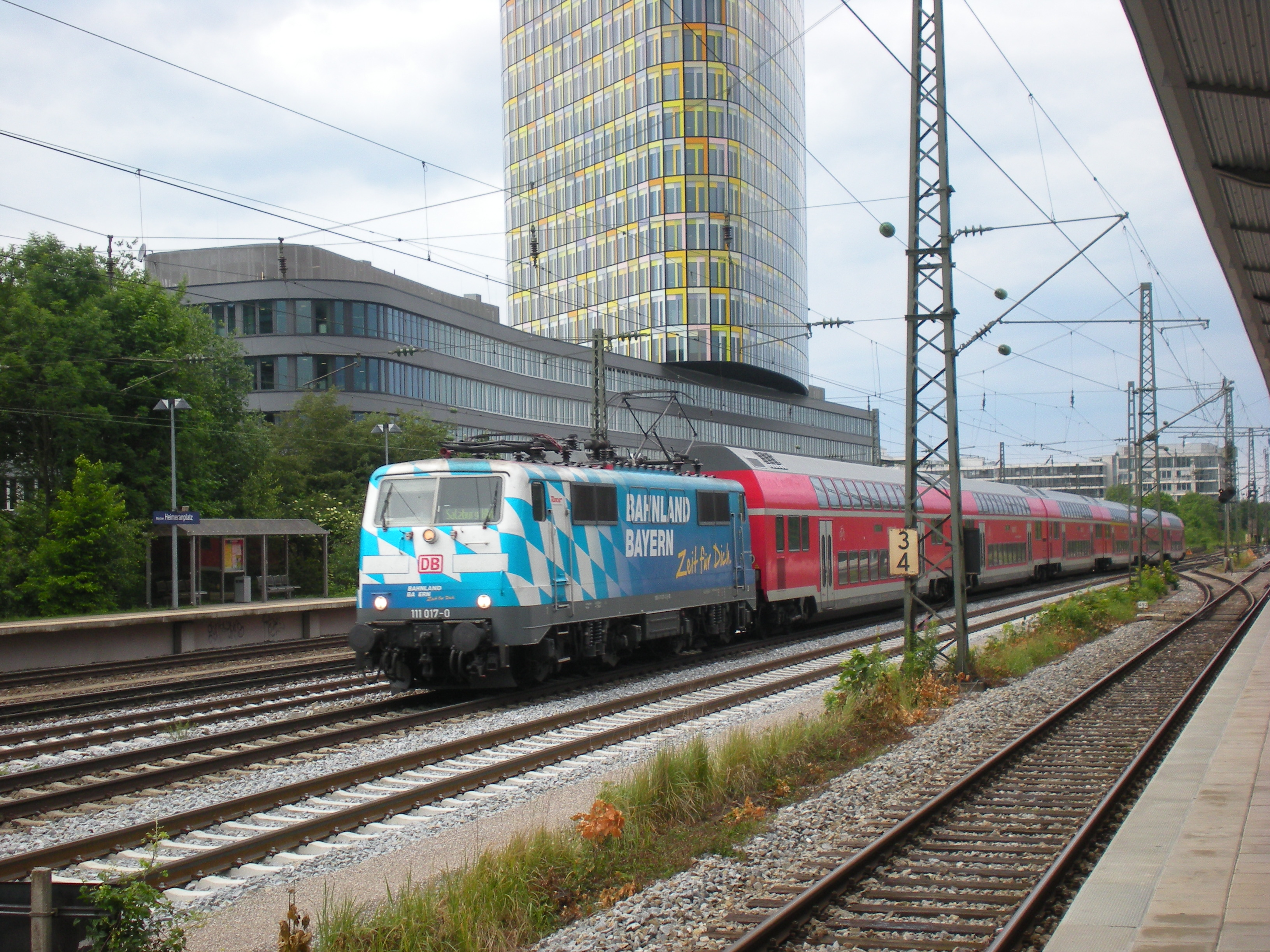 Regional-Express von München nach Salzburg bei der Durchfahrt durch den Bahnhof Heimeranplatz